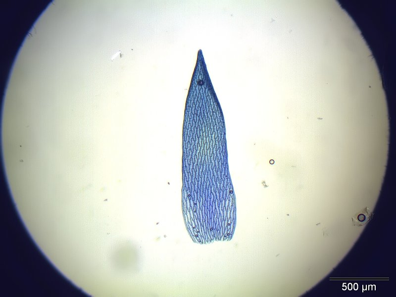 Trügerisches Torfmoos (Sphagnum fallax), Astblatt, Vergrößerung: 40x